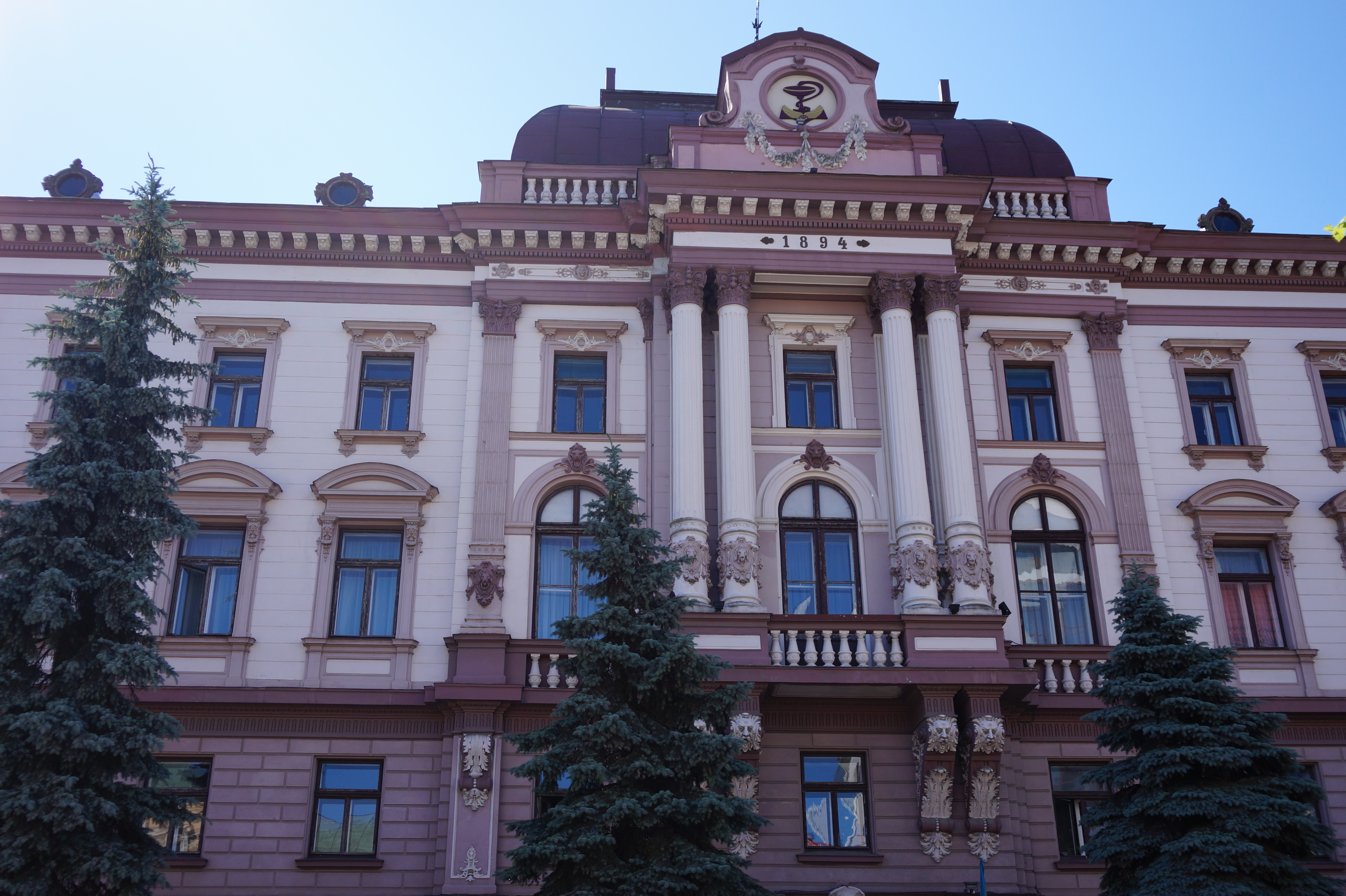 Австрійська дирекція залізниці, пізніше польський магістрат (мур.), Івано-Франківськ, вул. Галицька, 2